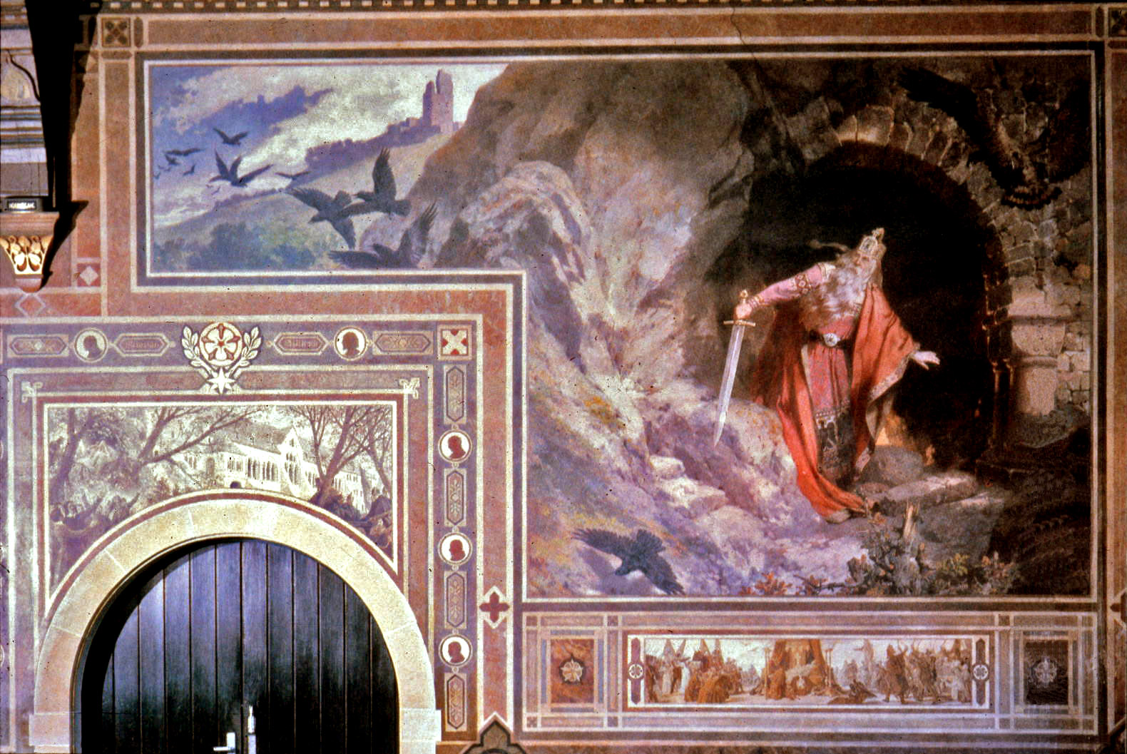 Barbarossas Erwachen (1880) - Wandgemälde von Hermann Wislicenus (1825-1899) in der Kaiserpfalz zu Goslar